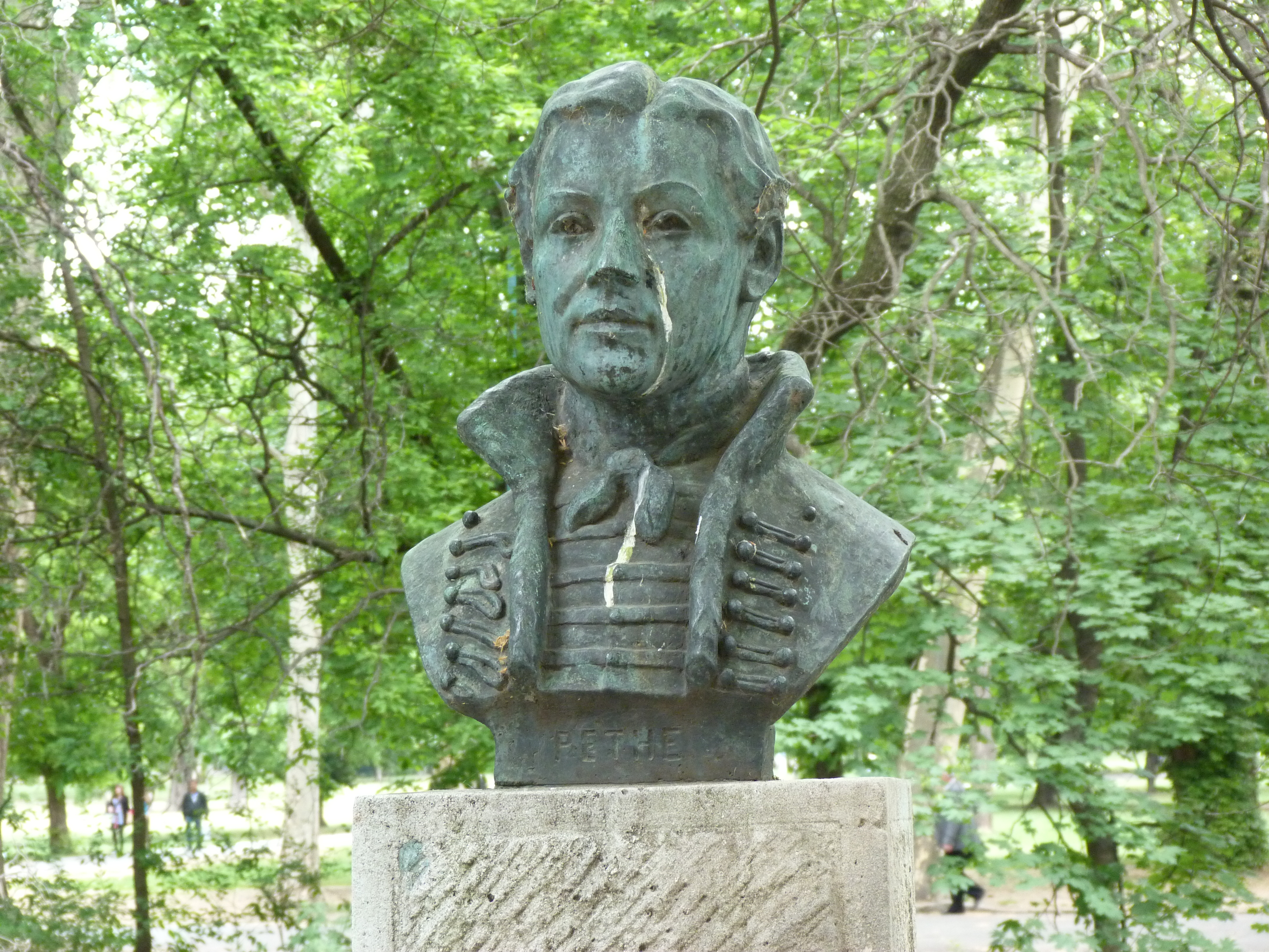 Budapesten, a Városligetben. Pethe Ferenc szobra. Lásd még File:Pethe Ferenc (3).JPG.